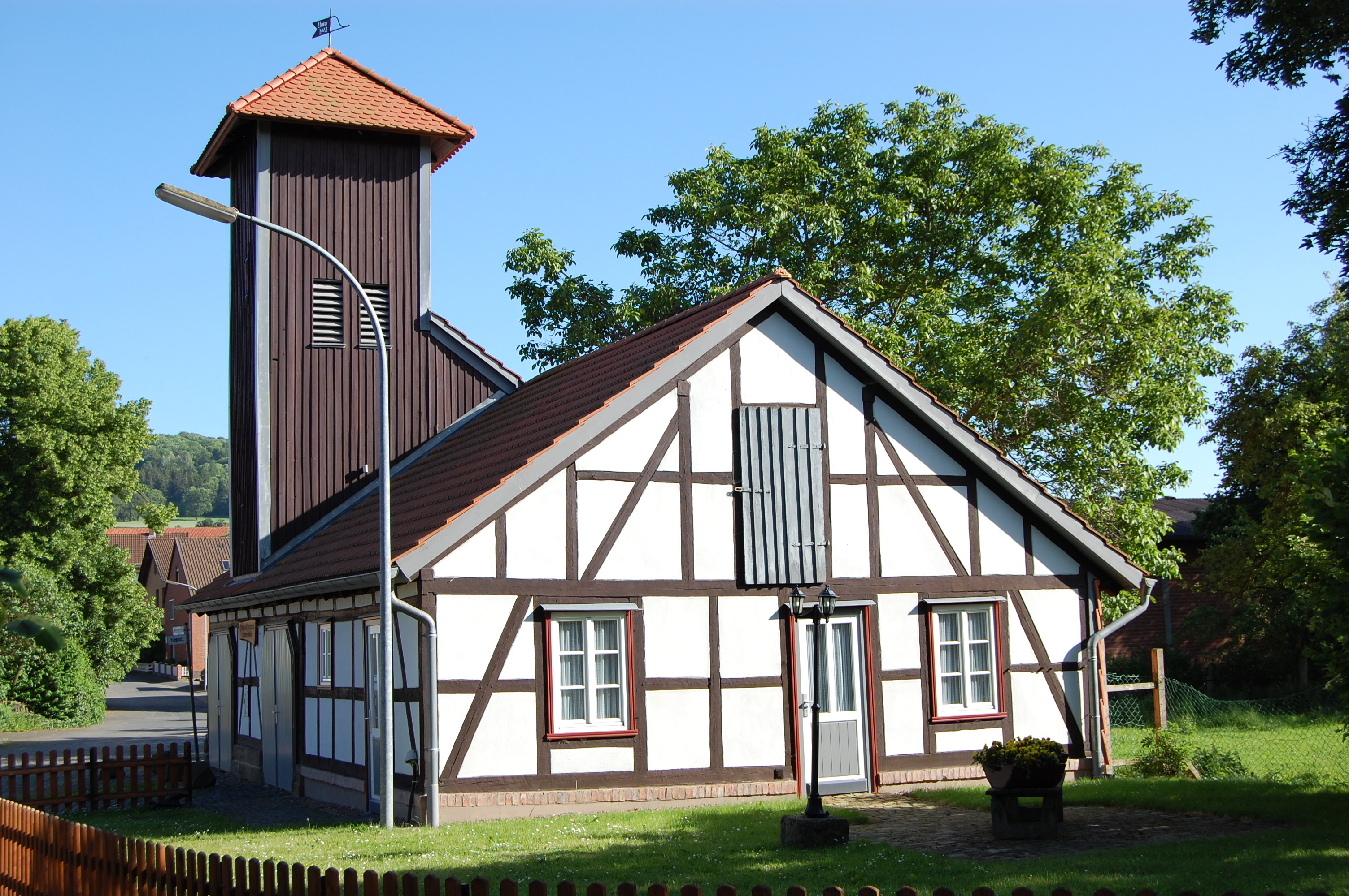 Historisches Spritzenhaus in 37139 Adelebsen, Ortschaft Barterode, Thieplatz 1, Einzeldenkmal Nr. 152001.0091